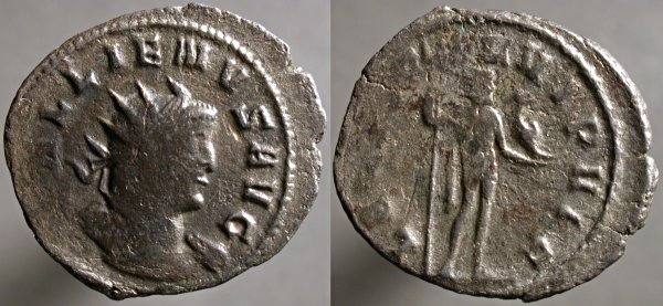 Gallieno, antoniniano di biglione, zecca di Mediolanum Milano GALLIENVS AVG, busto radiato e corazzato a destra, un nastro dietro, uno attraverso la spalla LEG XI CL VI P VI F, Nettuno in piedi di fronte, testa a destra, tridente nella sinistra, delfino nella destra. Göbl MIR 993o La moneta fa riferimento alla Legio XI Claudia Licensing Moneta da HobbyBlog, foto di Ed Flinn. Permesso: Utente:Panairjdde/HobbyBlog Coin from HobbyBlog, photo by Ed Flinn. Permission: Utente:Panairjdde/HobbyBlog